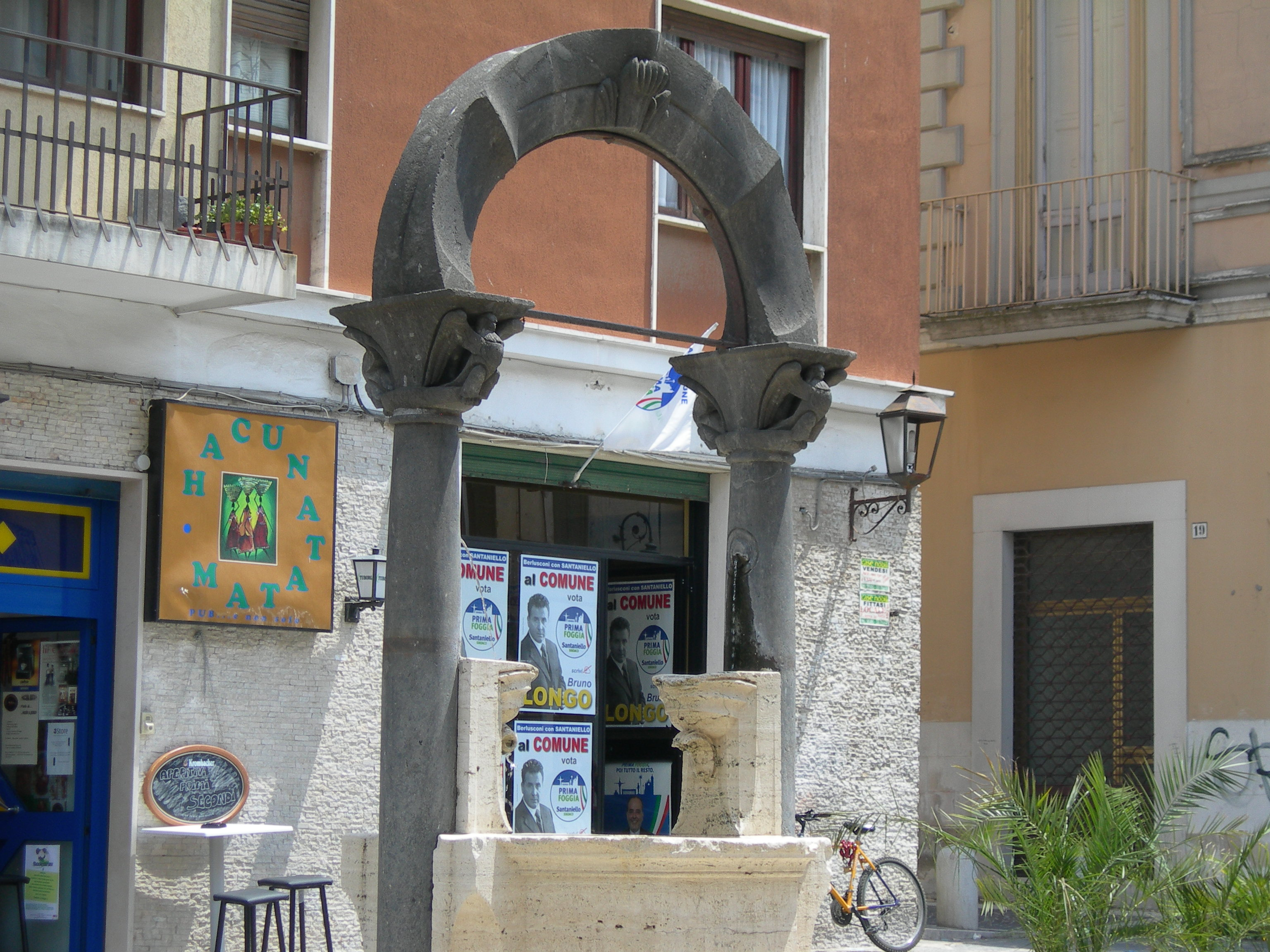 Pozzo di Federico II a Foggia